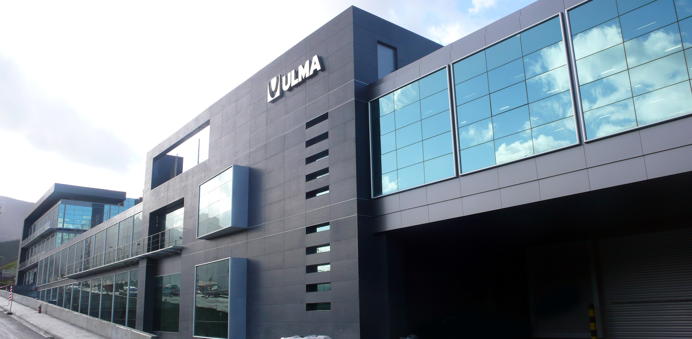 Sede central del Grupo ULMA en Oñate